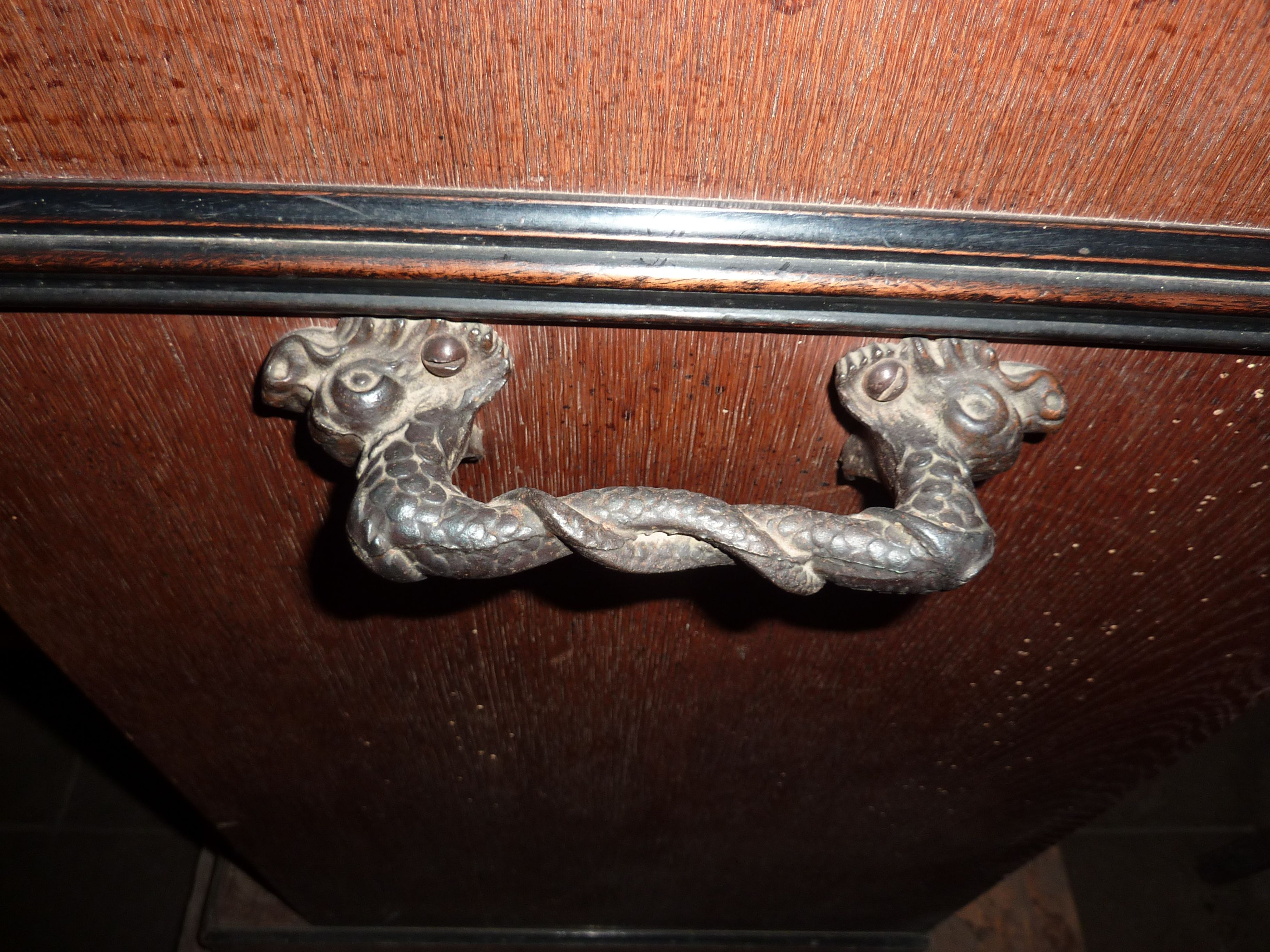 Poignée d'harmonium, église de Moirans, Isère, France